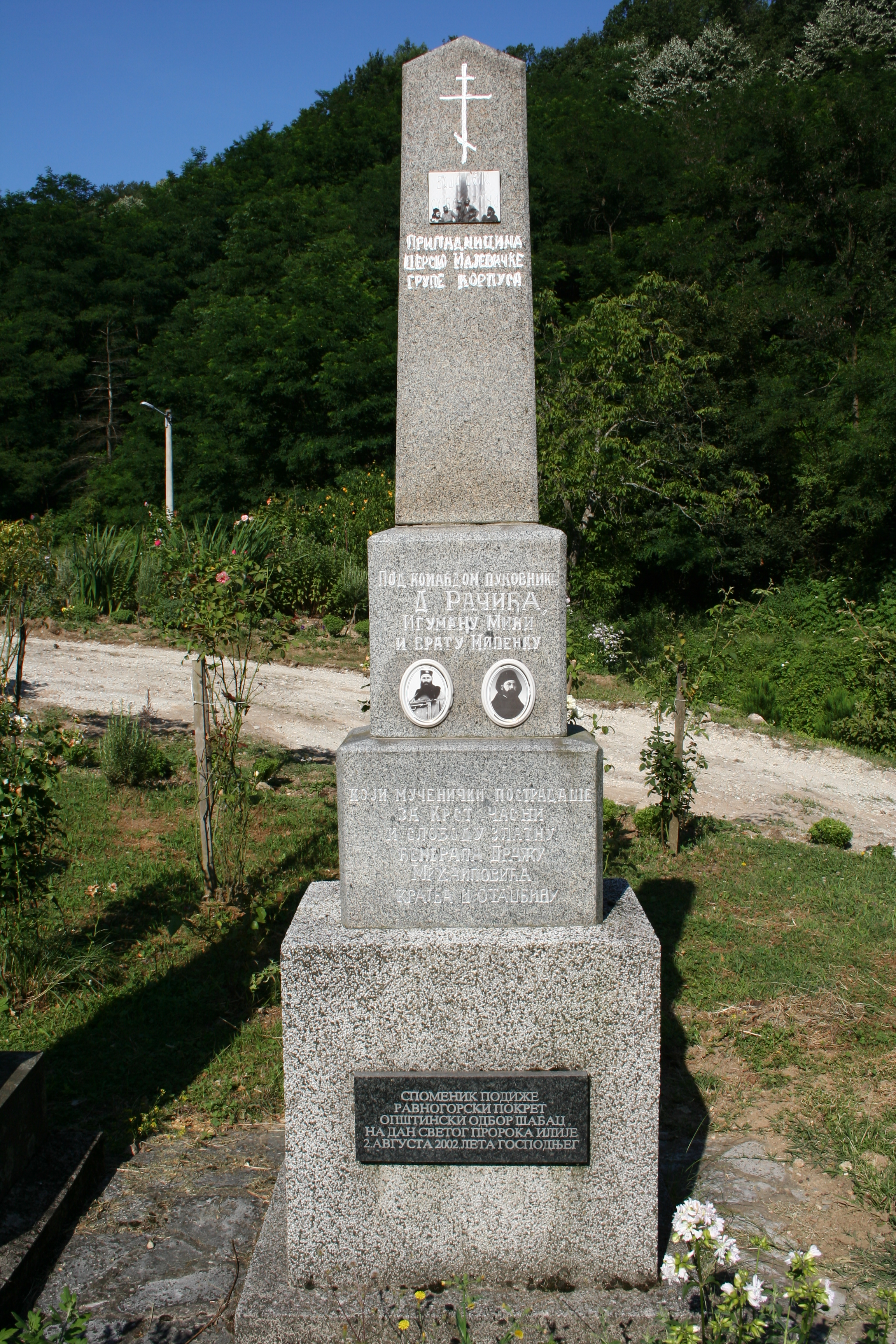 Manastir Radovašnica